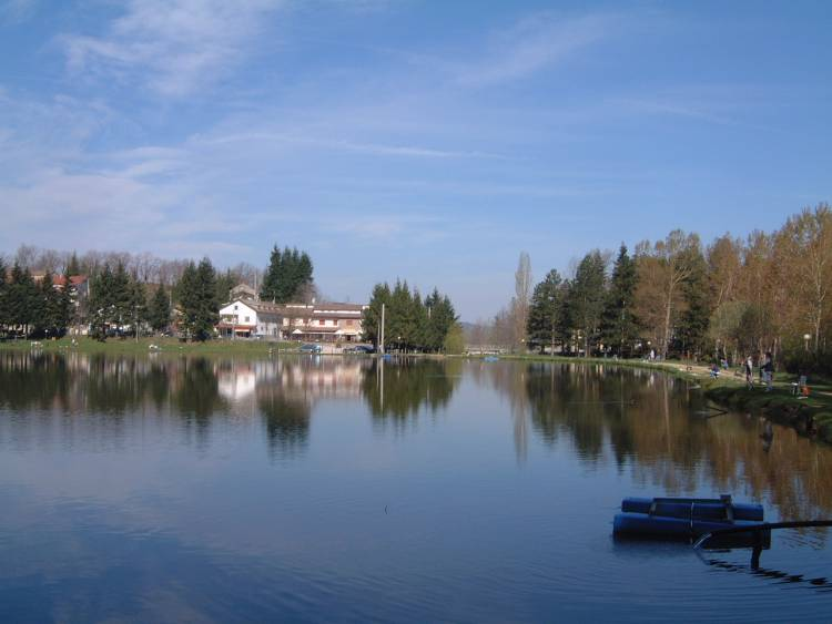 Je suis l'auteur de cette photo prise en avril 2007 à Acquapartita (vallée du Savio, Italie).